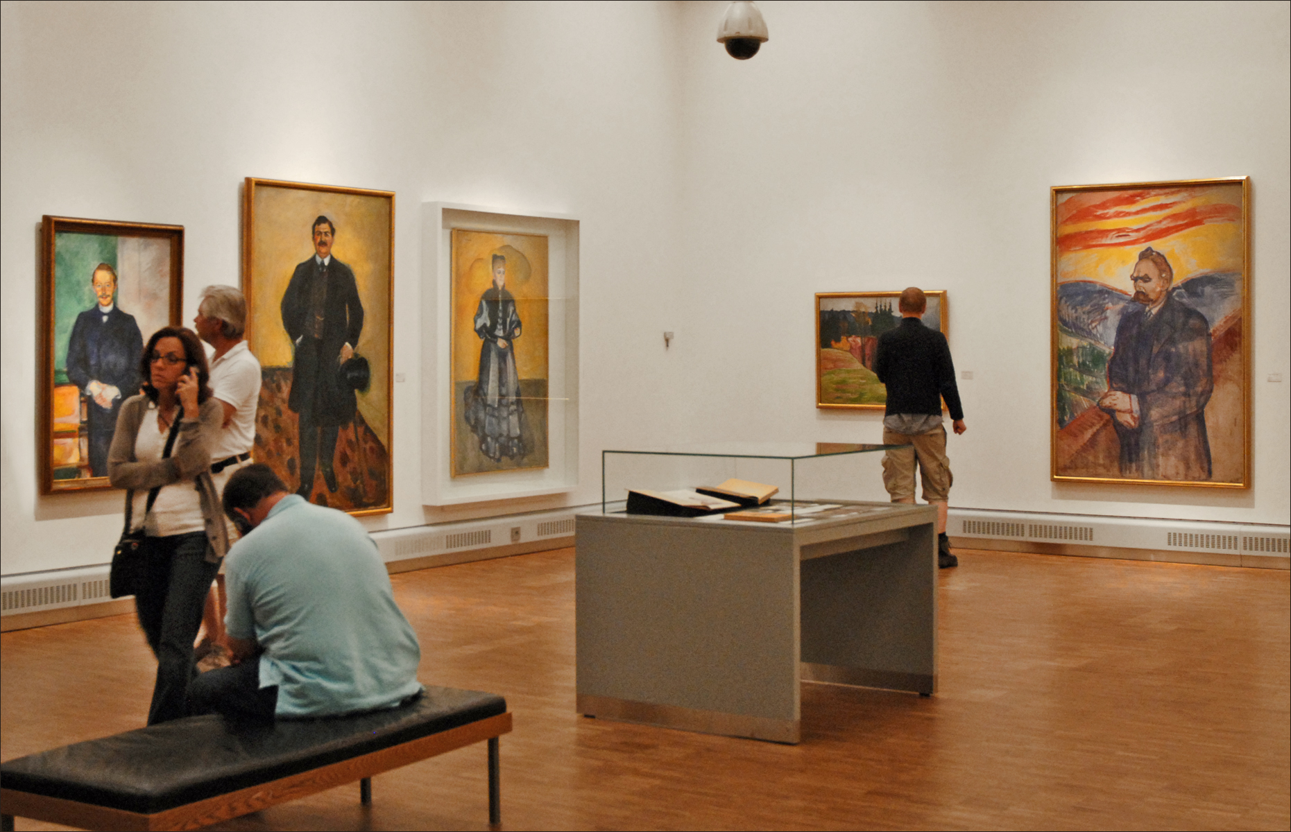 Au fond à droite, le portrait du philosophe Friedrich Nietzsche, 1906 Huile sur toile Sur commande, Munch a peint ce portrait idéal de Friedrich Nietzsche à partir de photographies. Edvard Munch (1863-1944) a légué une collection de 1.100 peintures, 3000 dessins et 18 000 gravures à la ville d'Oslo. Un musée consacré à l'artiste a été construit, dans le quartier Toyen d'Oslo, pour présenter ses oeuvres au public, le bâtiment a été inauguré en 1963. Le bâtiment actuel est trop petit pour exposer dans de bonnes conditions une si importante collection et il est un peu loin du centre-ville. A la suite du vol du tableau "le Cri", en 1994 et en 2004, les mesures de sécurité et les contrôles effectués sur les visiteurs ont été fortement renforcés au point de devenir semblables à celles qu'on rencontre dans les aéroports ! Comme dans tous les musées nationaux norvégiens, les gardiens sont des vigiles de la société Securitas. Les photos sont permises dans le musée mais les oeuvres de Munch, mort en 1944, ne sont pas encore dans le domaine public (voir ADAGP). Les photos des oeuvres isolées de leur contexte muséographique sont donc réservées à mon cercle d'amis. Un nouveau musée Munch est en construction dans le quartier Bjorvika près de l'Opéra. Le cabinet espagnol "Herreros Arquitectos" a été choisi par la ville. site du projet site du studio d'architecture